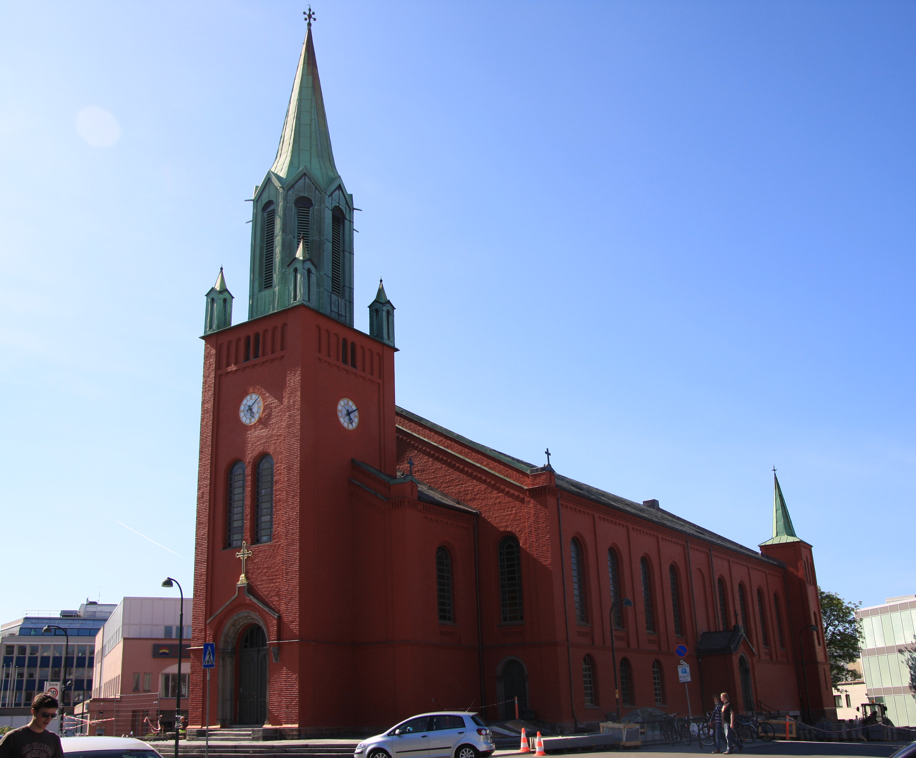 Sankt Petri kirke (2009), Stavanger